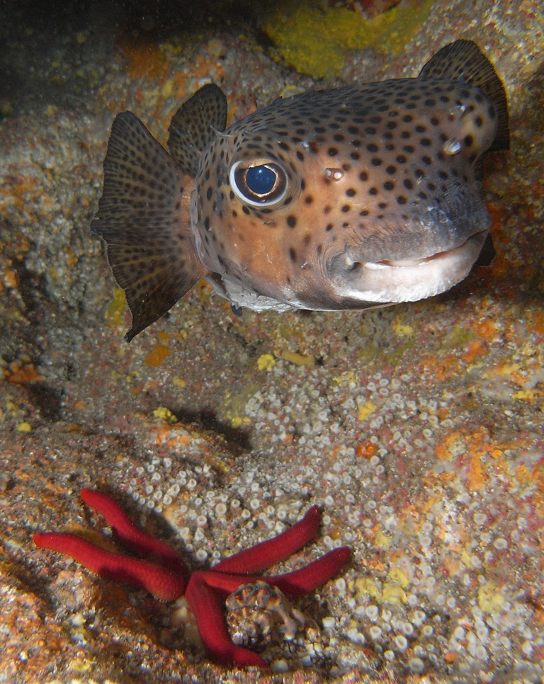 Chilomycterus atringa - Spotfin burrfish / Tamboril espinoso / Diodon porc-épic & Ophidiaster ophidianus - Snake sea star / Estrella serpiente (estrella de mar púrpura) / Astérie serpent (Astérie pourpre), el Hierro.